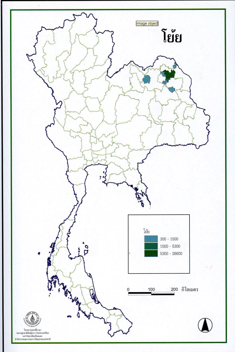 การกระจายตัวของภาษาโย้ยในประเทศไทย